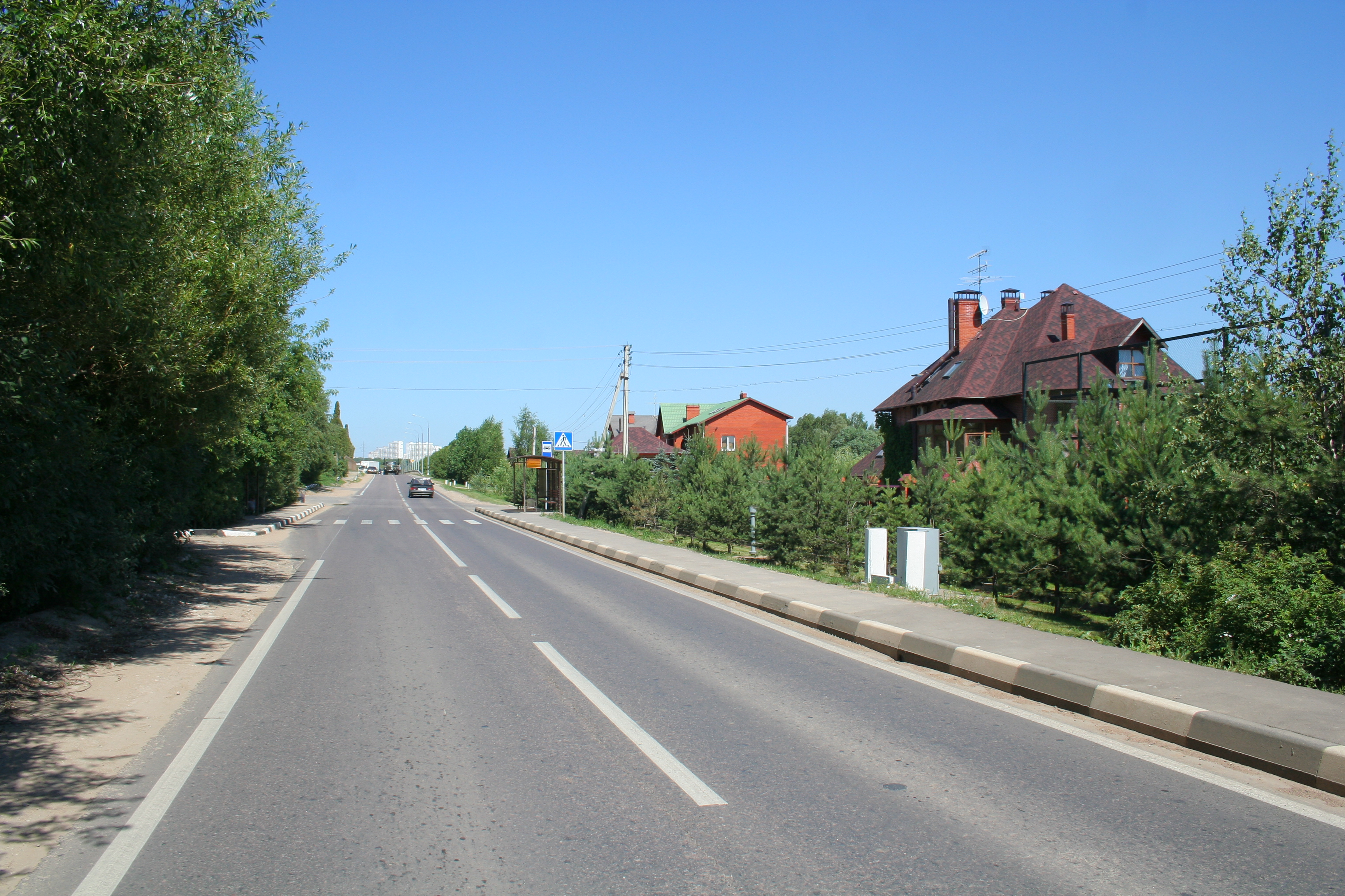 Hauptstraße des Dorfes Skolkowo, Oblast Moskau, Russland.